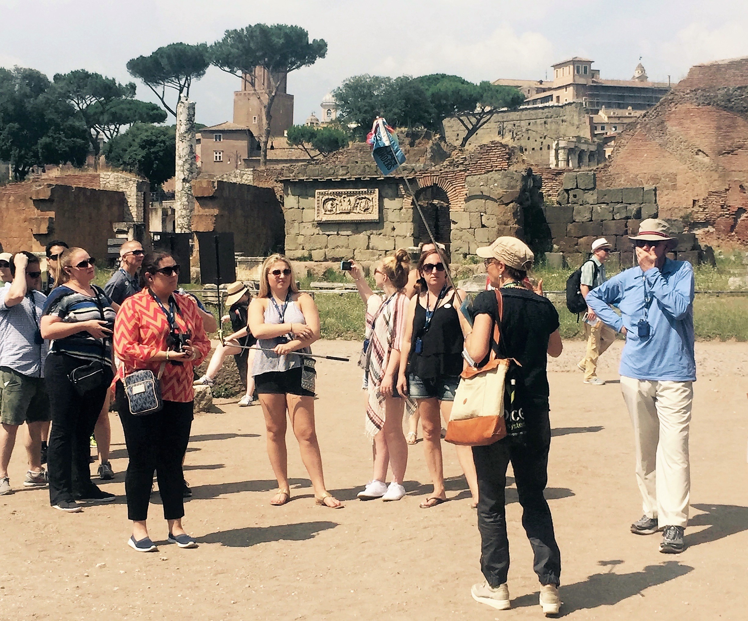 Eine Fremdenführerin mit einer Gruppe Touristen an einer archäologischen Stätte im Stadtteil Campo Marzio in Rom, Italien.